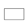 Geometrisk figur: Rektangel Gjord av Användare:Anp. PD; se Användare:Habj/Upphovsrätt inklusive diskussionsidan